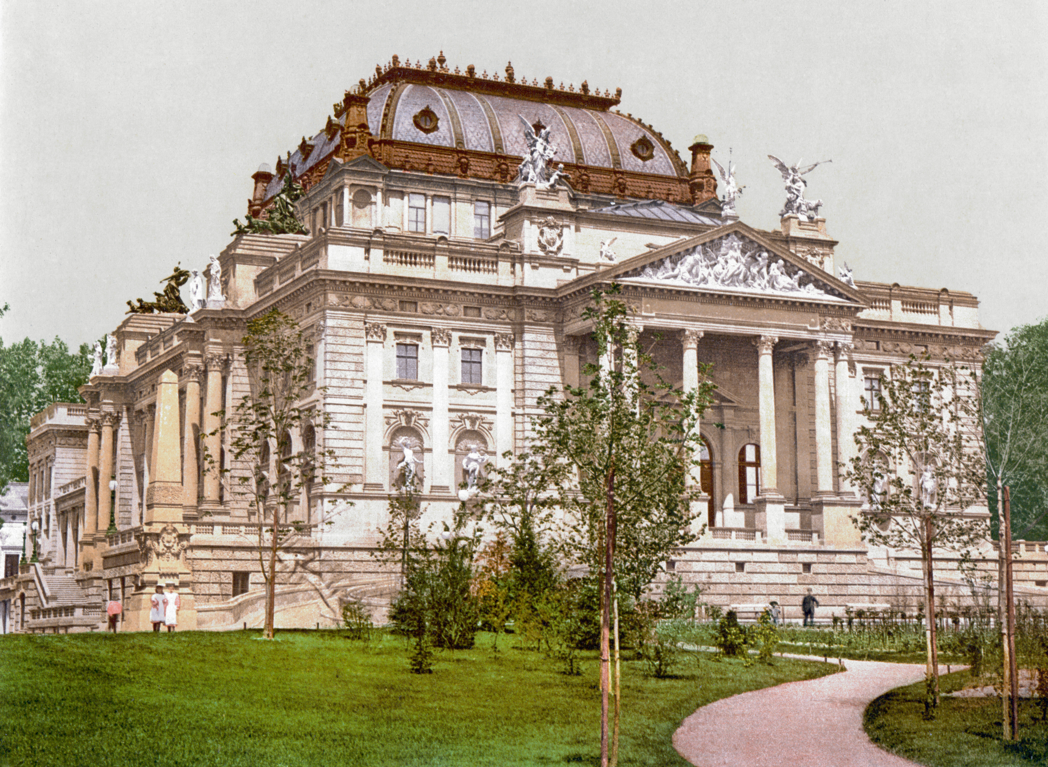 Königliches Schauspielhaus Wiesbaden